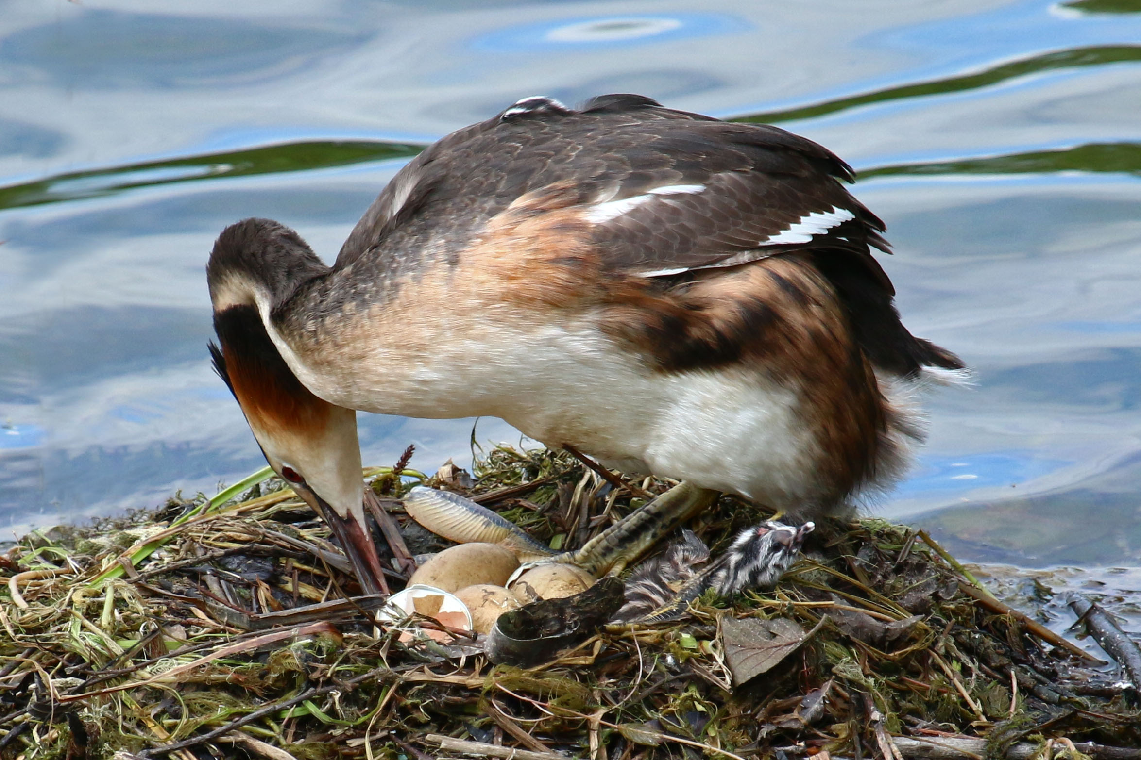 Dieses Haubentaucherküken im Düsseldorfer Südpark ist gerade erst geschlüpft. Noch liegt die kaputte Eierschale im Nest. In ein paar Tagen werden auch die anderen Küken im Nest sitzen und das Haubentaucherpärchen hat jede Menge damit zu tun die kleinen Schnäbel satt zu bekommen.